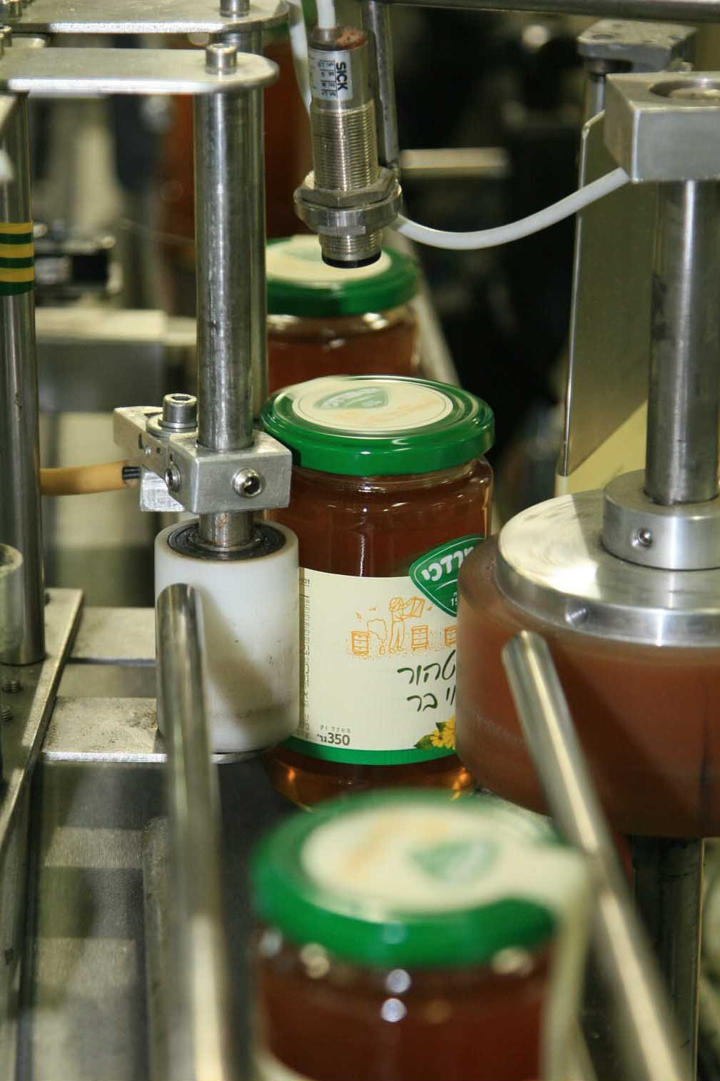 קו ייצור דבש במכוורת יד מרדכי